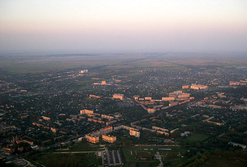 Boryspil